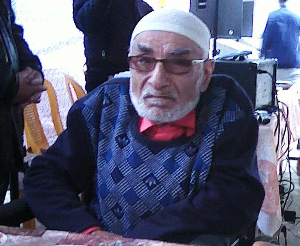 Хаёт Неъмат, таджикоязычный поэт и литературовед из города Самарканда (Узбекистан), член Союза писателей ТаджикистанаТоҷикӣ: Ҳаёт Неъмат, шоир ва адабиётшиноси тоҷикзабон аз шаҳри Самарқанд, узви Иттифоқи нависандагони Тоҷикистон